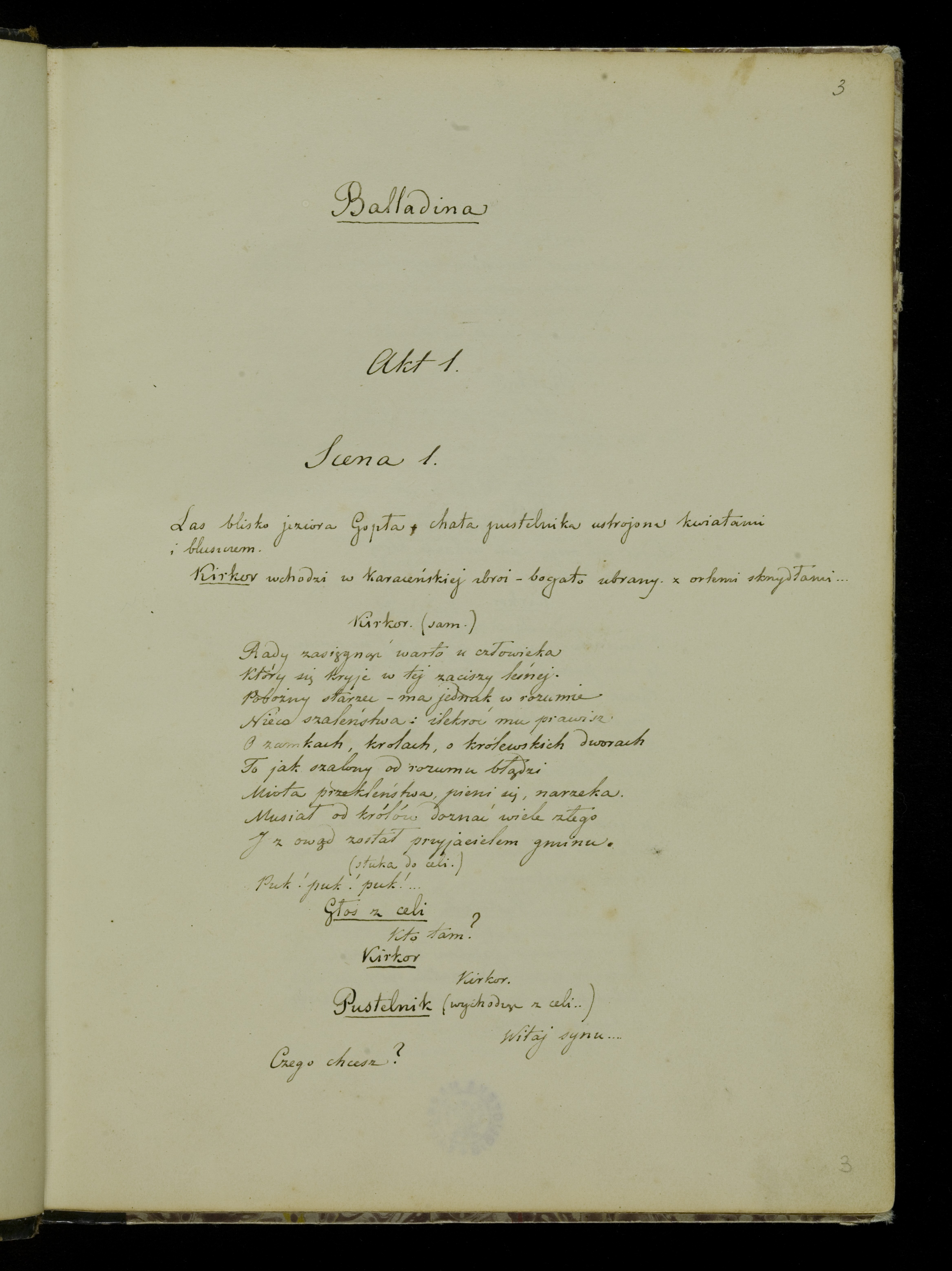 Rękopis "Balladyny" Juliusza Słowackiego